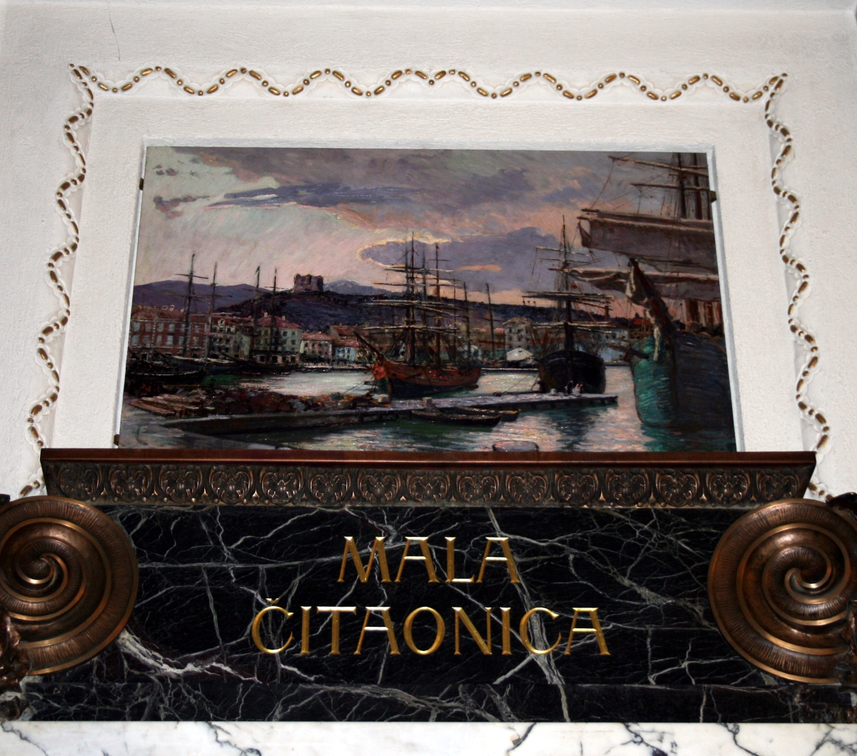 Jedno od pet ulja na platnu koja se nalaze u atriju Hrvatskog državnog arhiva, djelo "Senj" (prva hrvatska tiskara) Mencija Klementa Crnčića, snimljeno tijekom Noći muzeja u Hrvatskom državnom Arhivu u Zagrebu